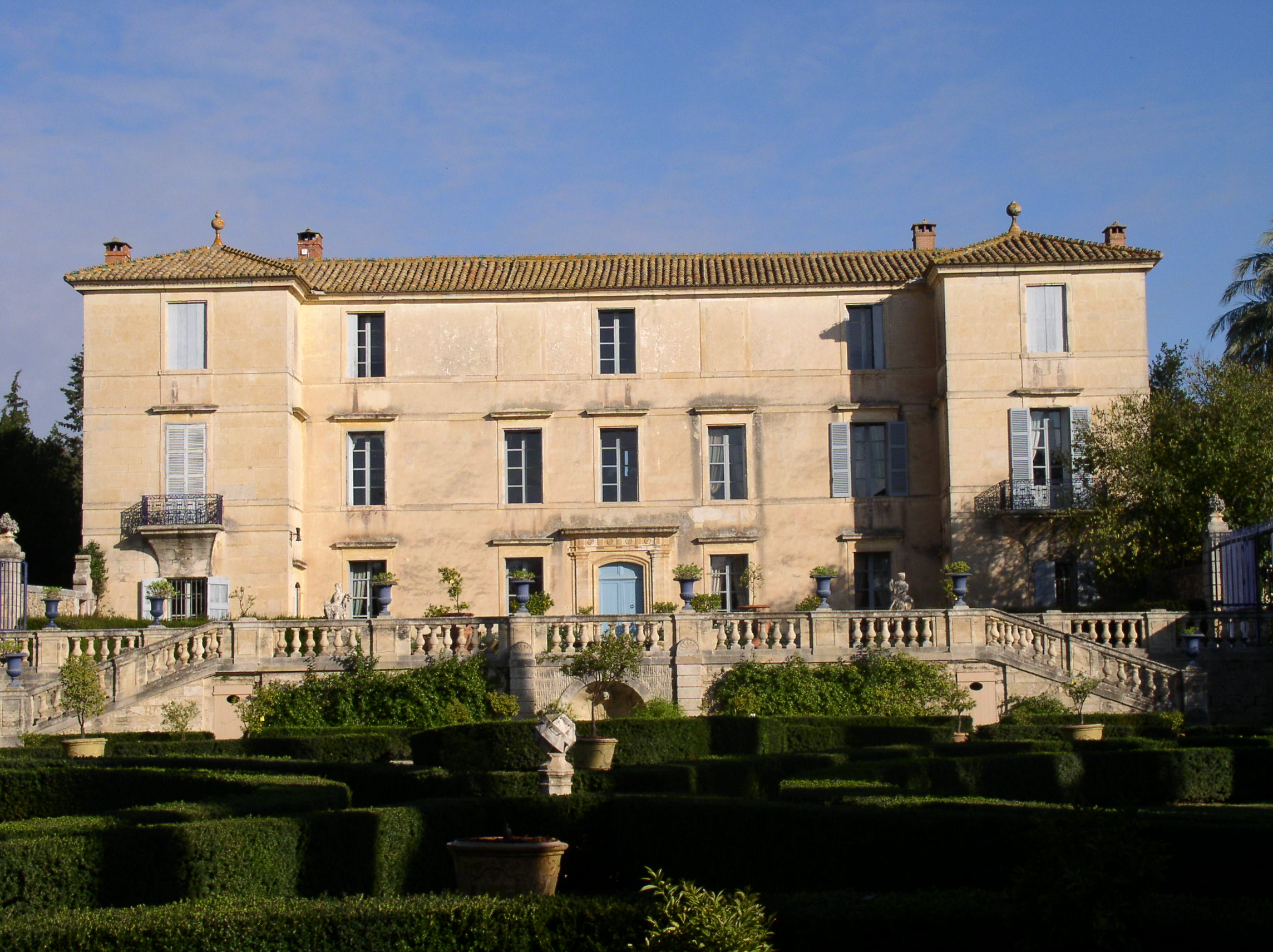 Le Château de Flaugergue à Montpellier (Hérault - 34)